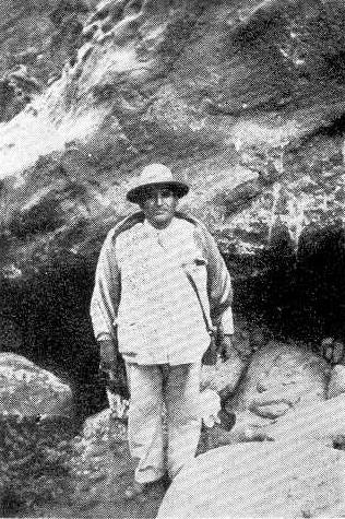 Carrizo, en los comienzos de su investigación en La Rioja. Algo prosaicamente, había cambiado su alón sombrero salteño por el fresco casco de corcho de los exploradores europeos; pero el traje que vistes es de auténtico picote jujeño (1939)